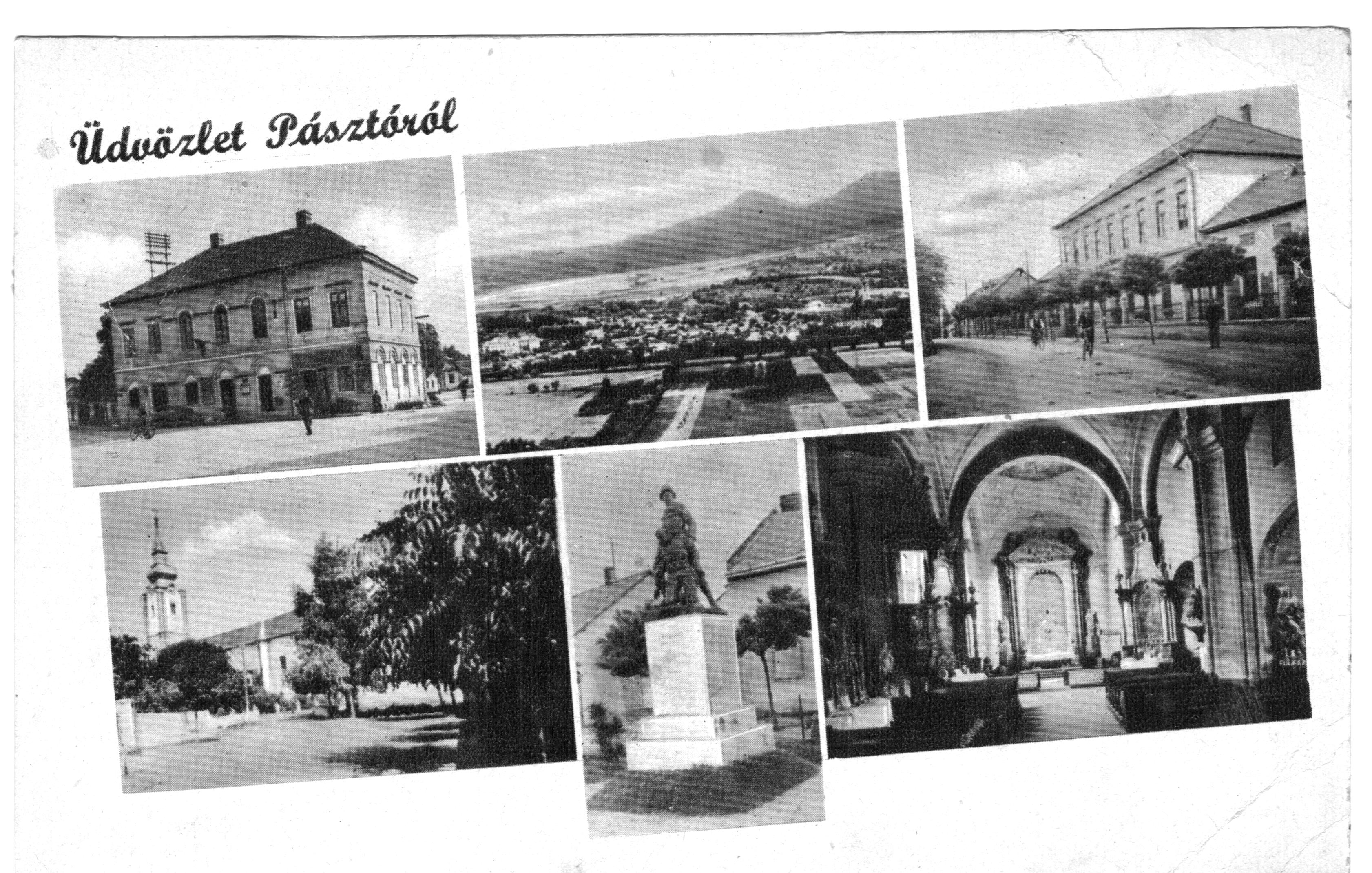 A felvételek Pásztón készültek, a képeslap előoldalán 6 fénykép. Hátoldalán nyomtatott szöveg: Bognár E. kiadása, Pásztó. A képeslap, hátoldalával együtt megjelent Creative Commons alatt a Metapolisz DVD sorozatban.